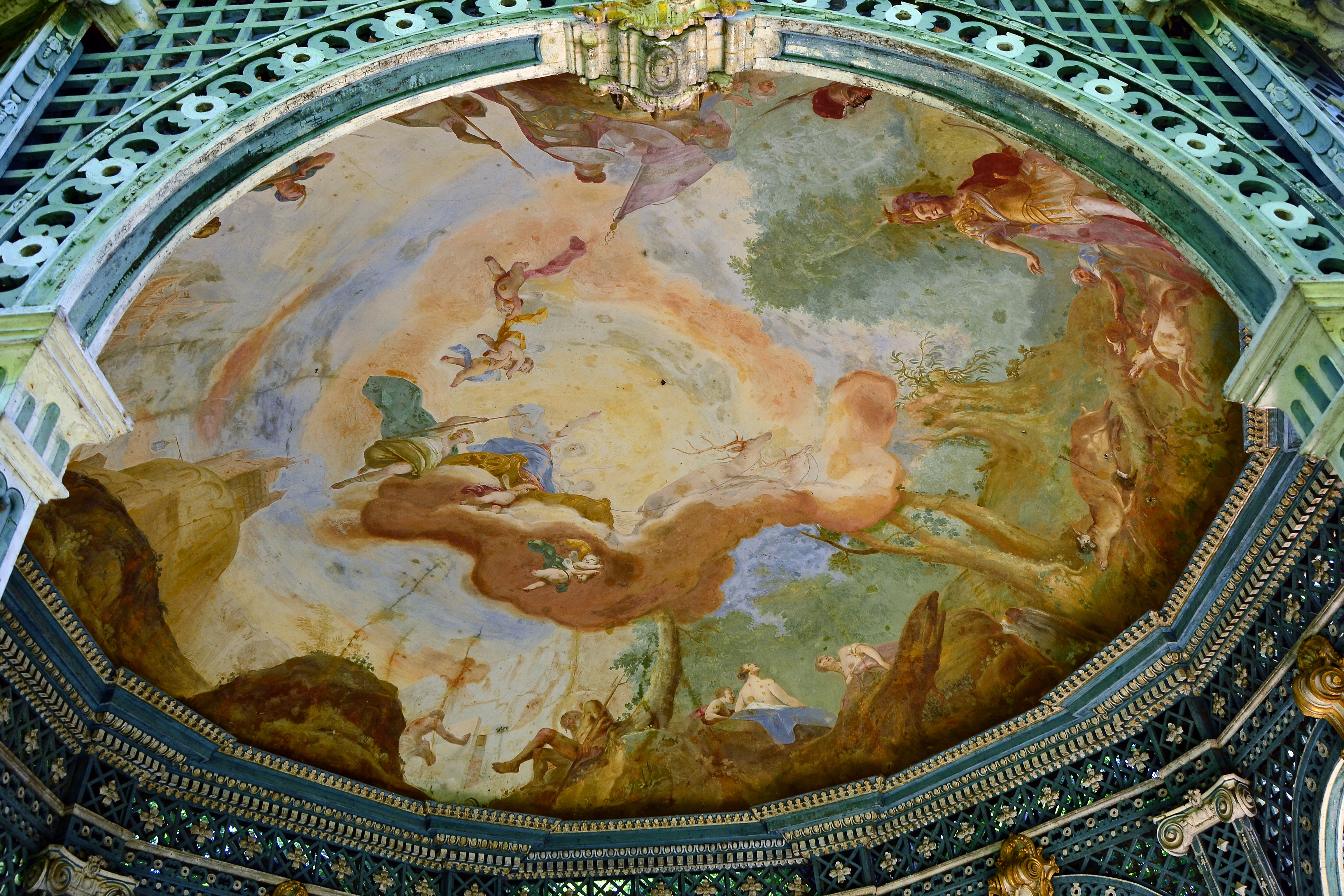 Grünes Lusthaus, Dianatempel. Dieser Pavillon aus der Zeit um 1760 war ein Lieblingsaufenthaltsort der Kaiserin Maria Theresia, die hier des öfteren Karten spielte. Treillagearchitektur (Laubengangarchitektur).